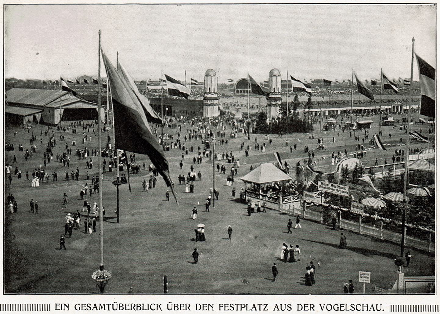 Deutsches Turnfest 1913 in Leipzig, Blick auf den Festplatz